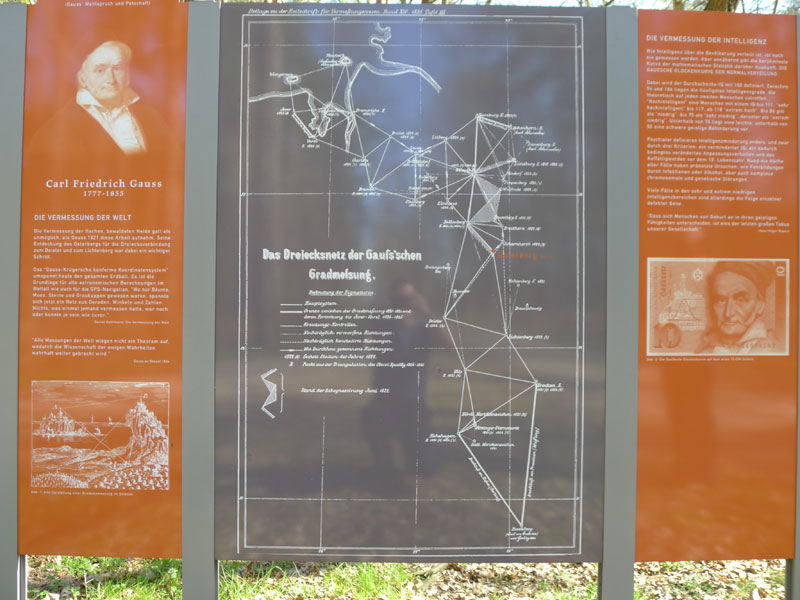 Messpunkt Garßen, Gauss, Vermessung der Welt